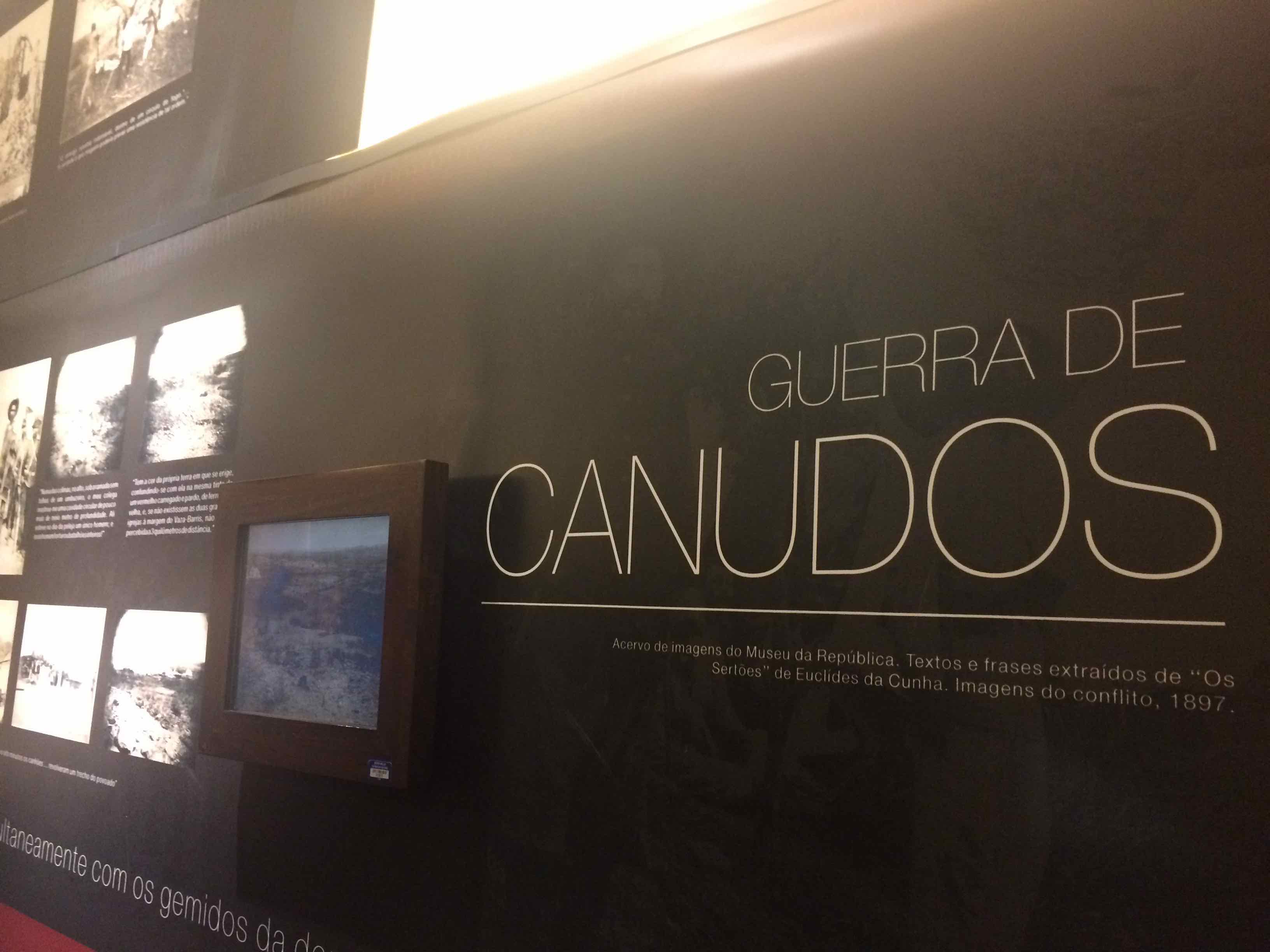 Exposição Guerra de Canudos, no Museu Histórico Pedagógico Prudente de Moraes, em Piracicaba-SP